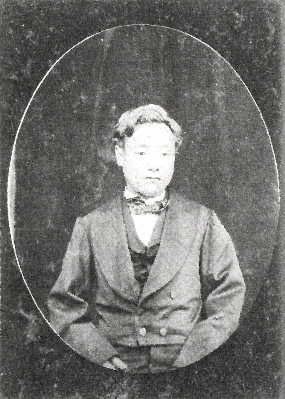 内藤文成の肖像写真。